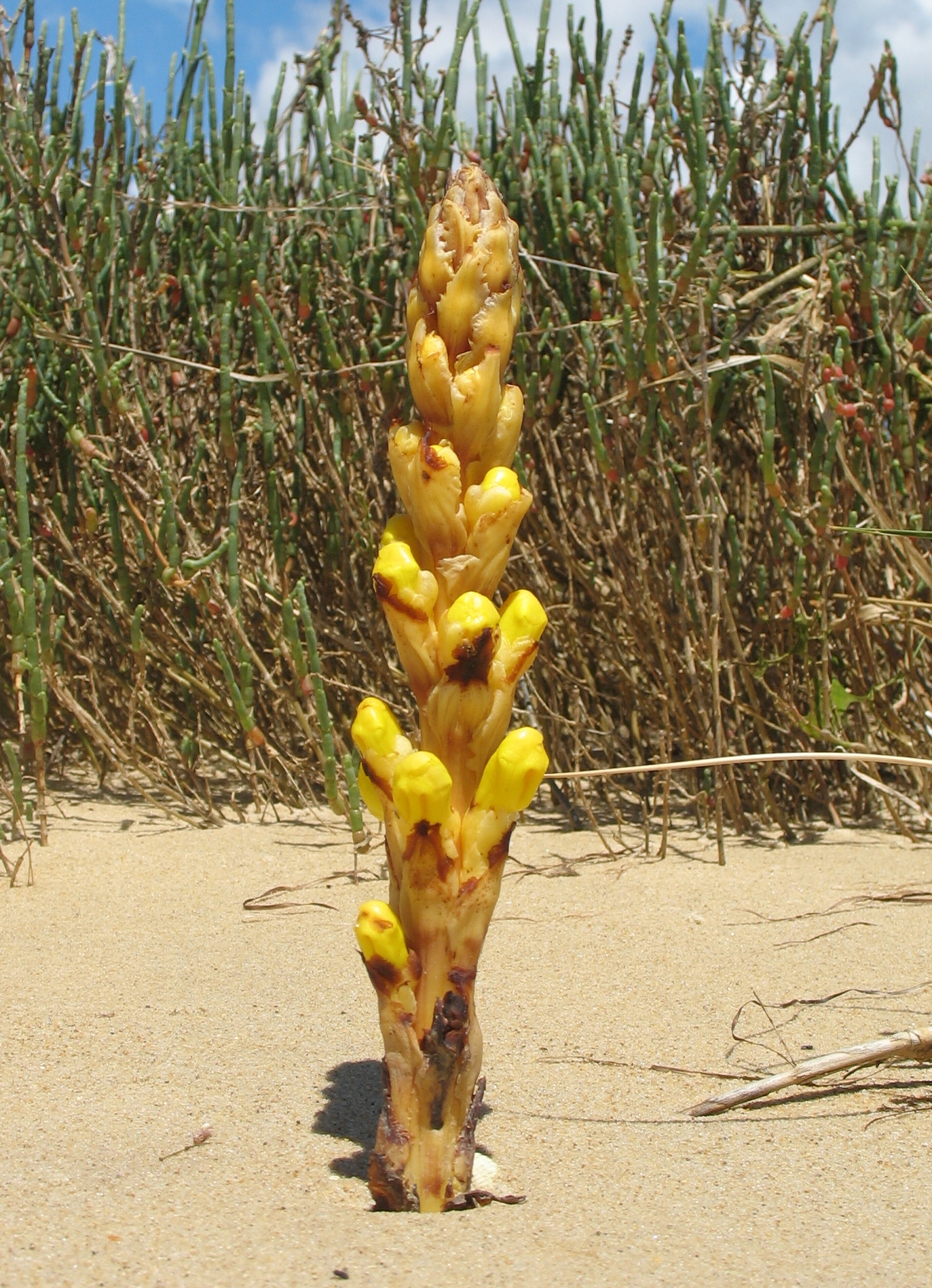 Cistanche phelypaea. Cabanas de Tavira, Portugal.